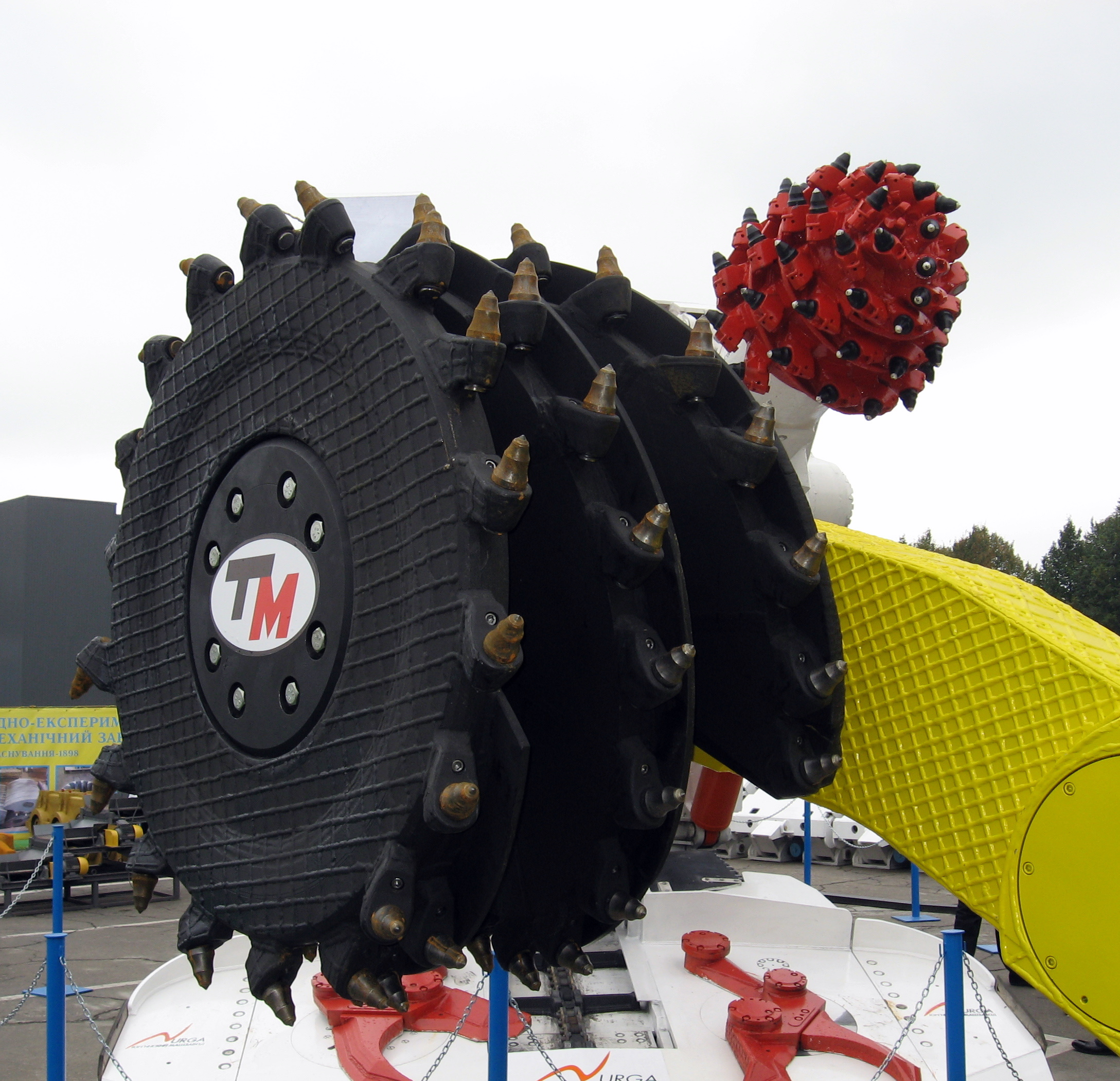 Фото з виставки Вугілля-Майнінг 2010